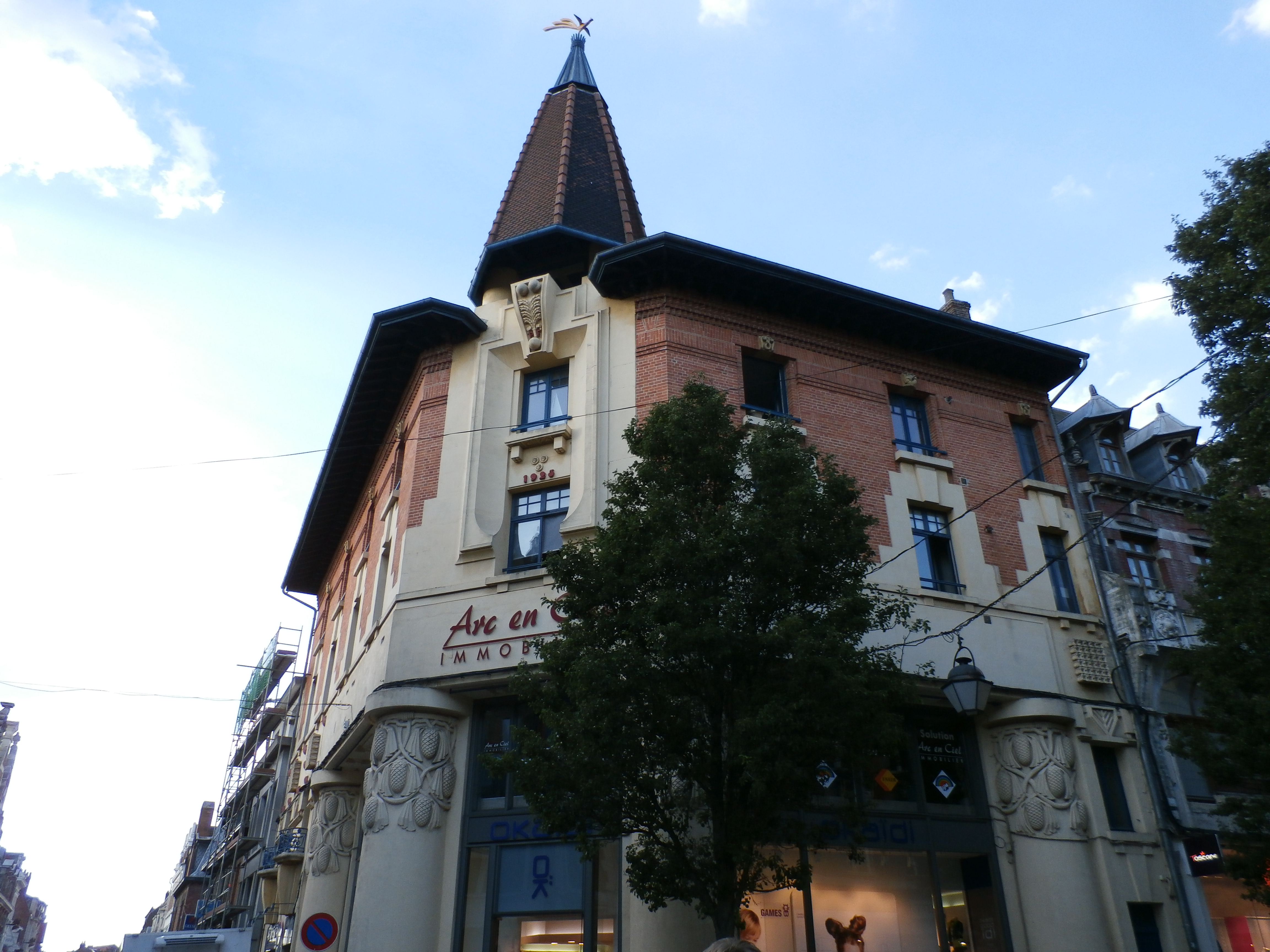 Béthune Librairie Fournier (Inscrit) .